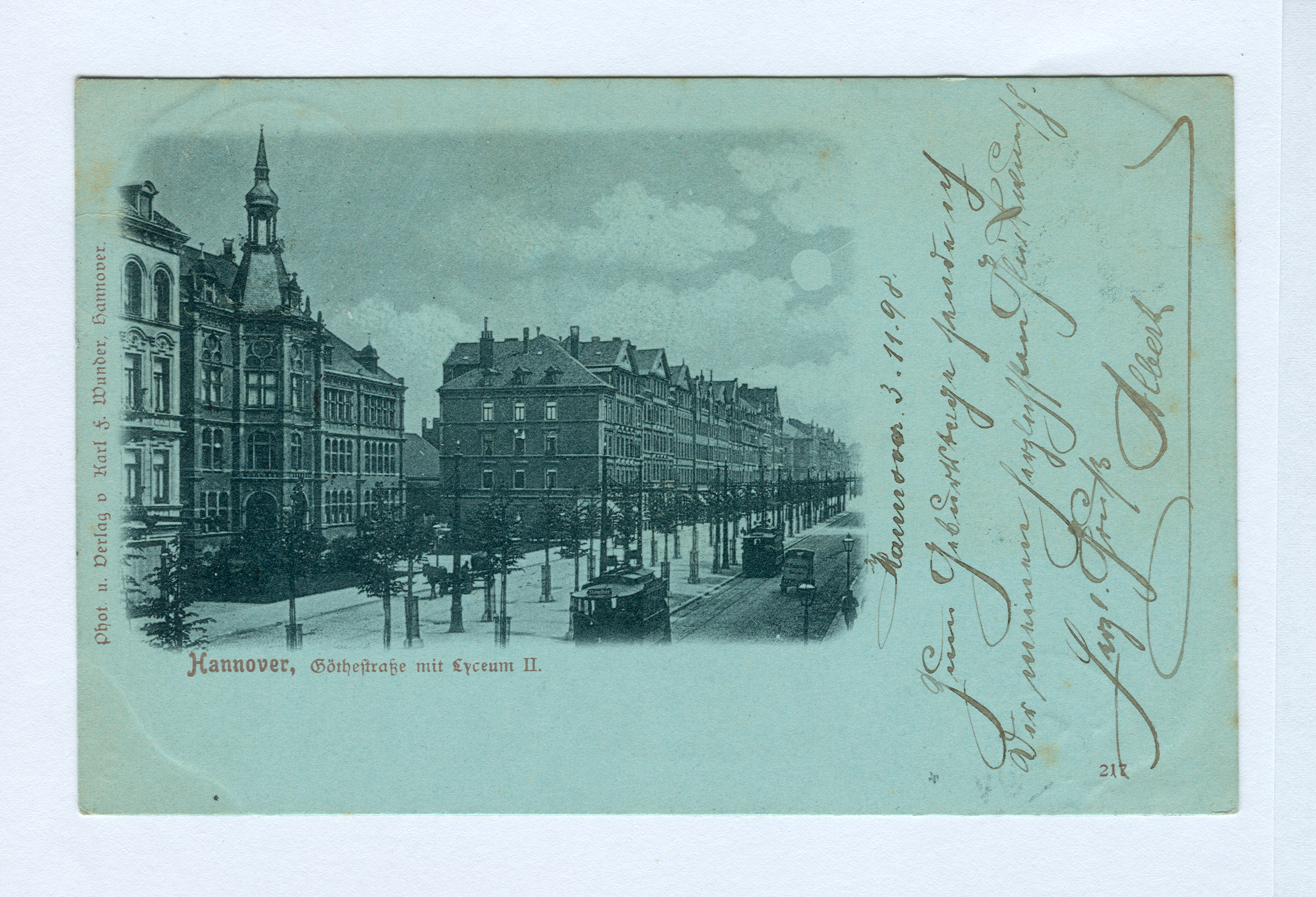 Das Zweite Gymnasium, Lyzeum II, in Hannover wurde 1871 gegründet und 1907 vom Staat übernommen. Nach einer Order des Stadtrates von 1912, der den Begriff Lyzeum den Höheren Mädchenschulen zuwies, wurde das Lyzeum I in Ratsgymnasium, das Lyzeum II in Goethe-Gymnasium umbenannt. Das Goethe-Gymnasium in der Goethestraße (Calenberger Neustadt) wurde im Zweiten Weltkrieg zerstört, ihm folgte 1955 die aus der Sophienschule hervorgegangene Goetheschule mit den Standorten Franziusweg 43 und An Mußmanns Haube.